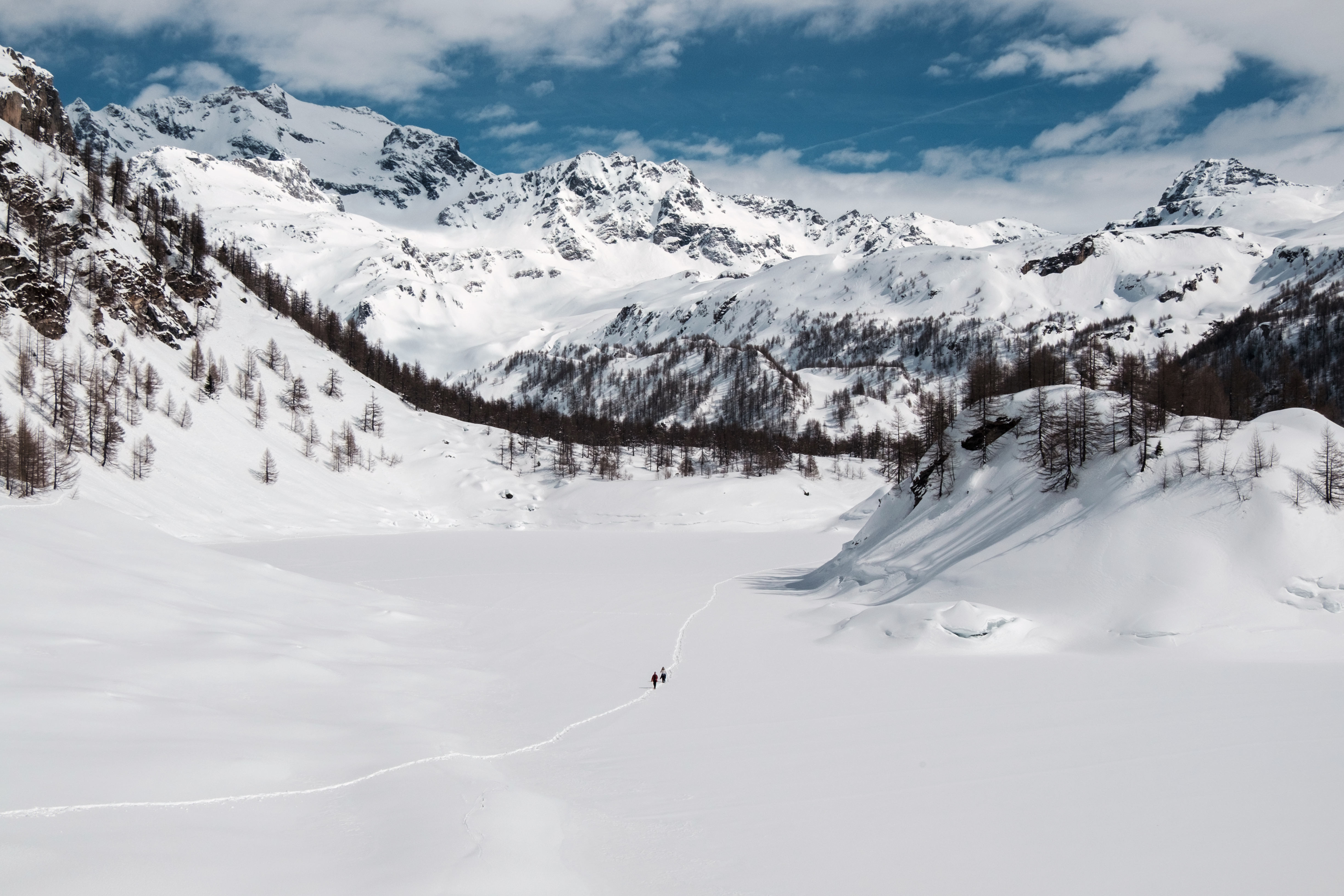 Lago di Devero ghiacciato (Q3364585)